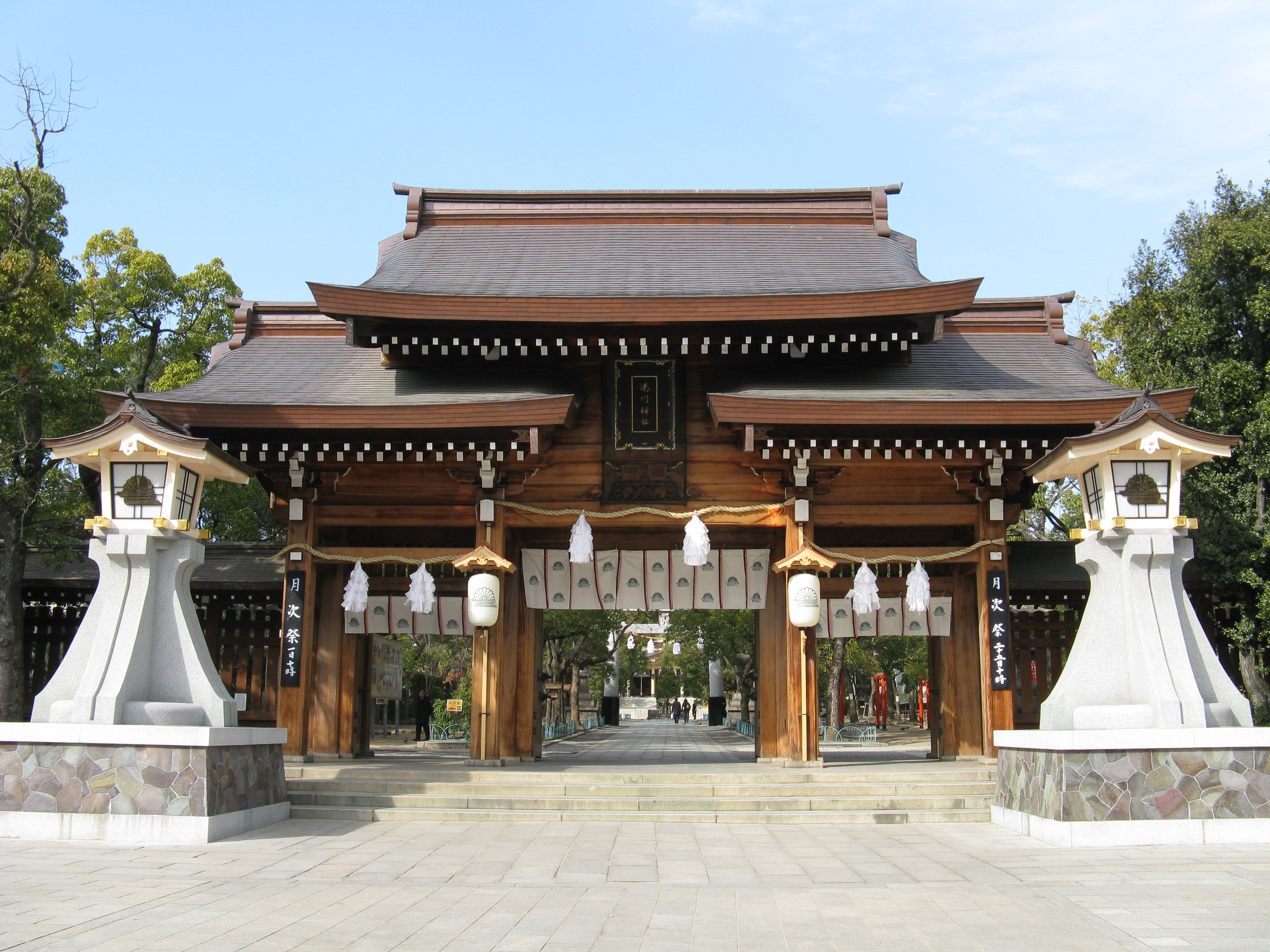 湊川神社 神門